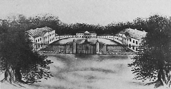 Беларуская (тарашкевіца): Высоцак (Vysocak). Сядзіба